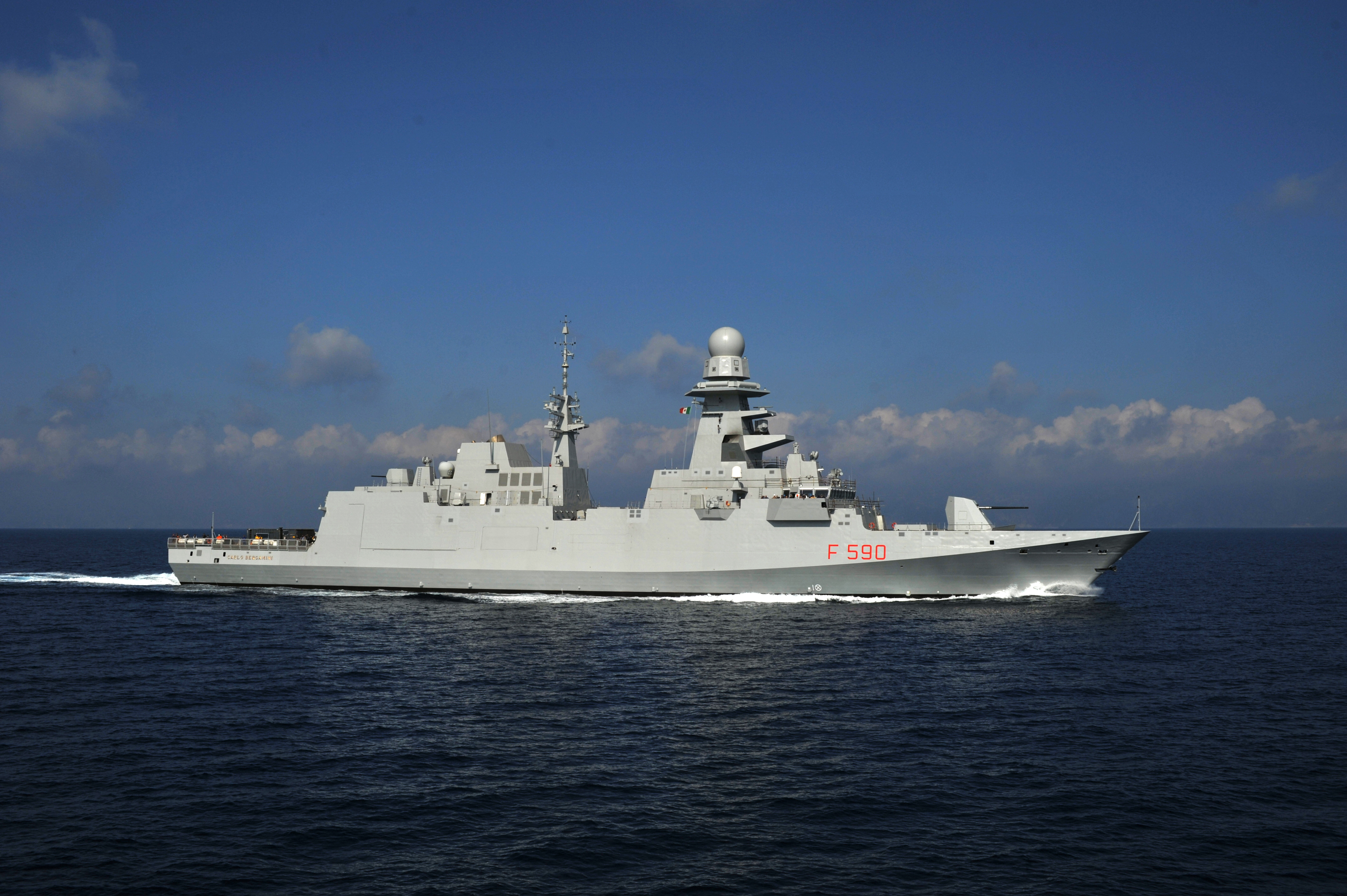 Prima uscita in mare di Nave Bergamini